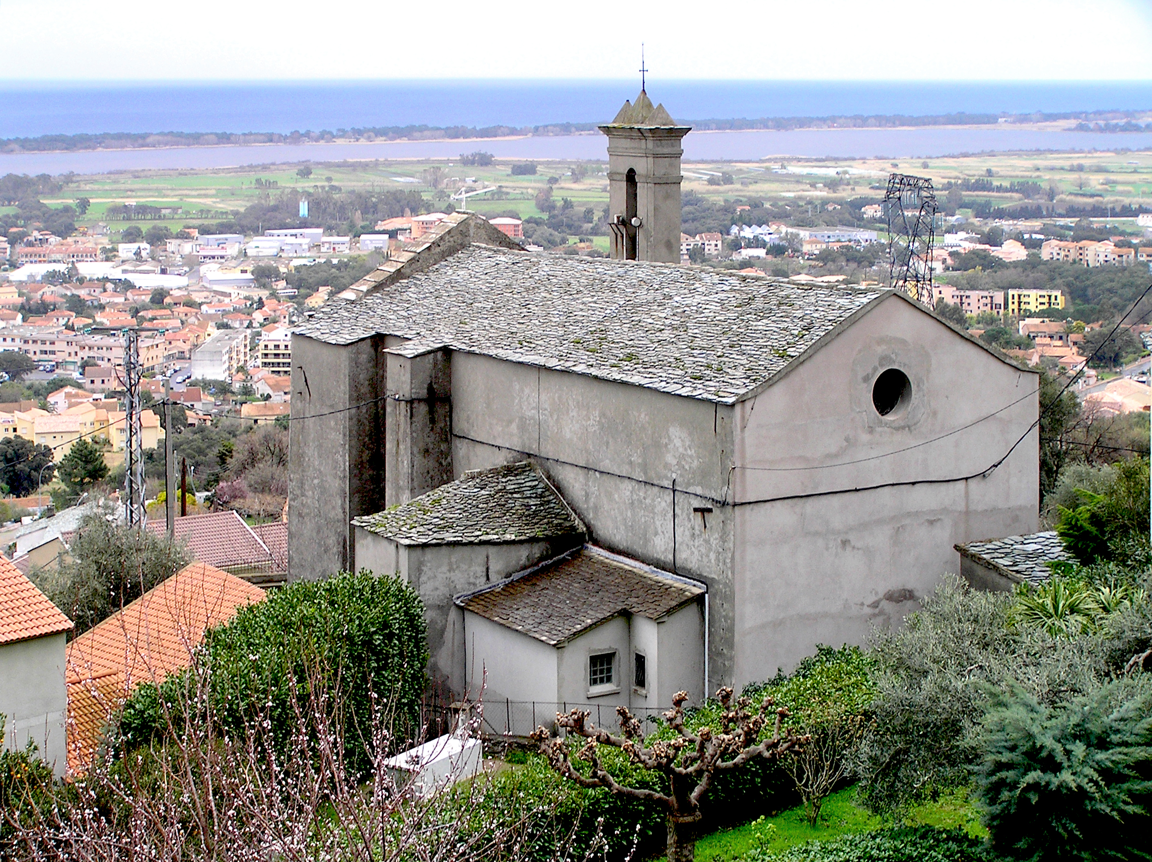 Biguglia, agglomération bastiaise (Haute-Corse) - L'église paroissiale Saint-André du XVIe siècle.